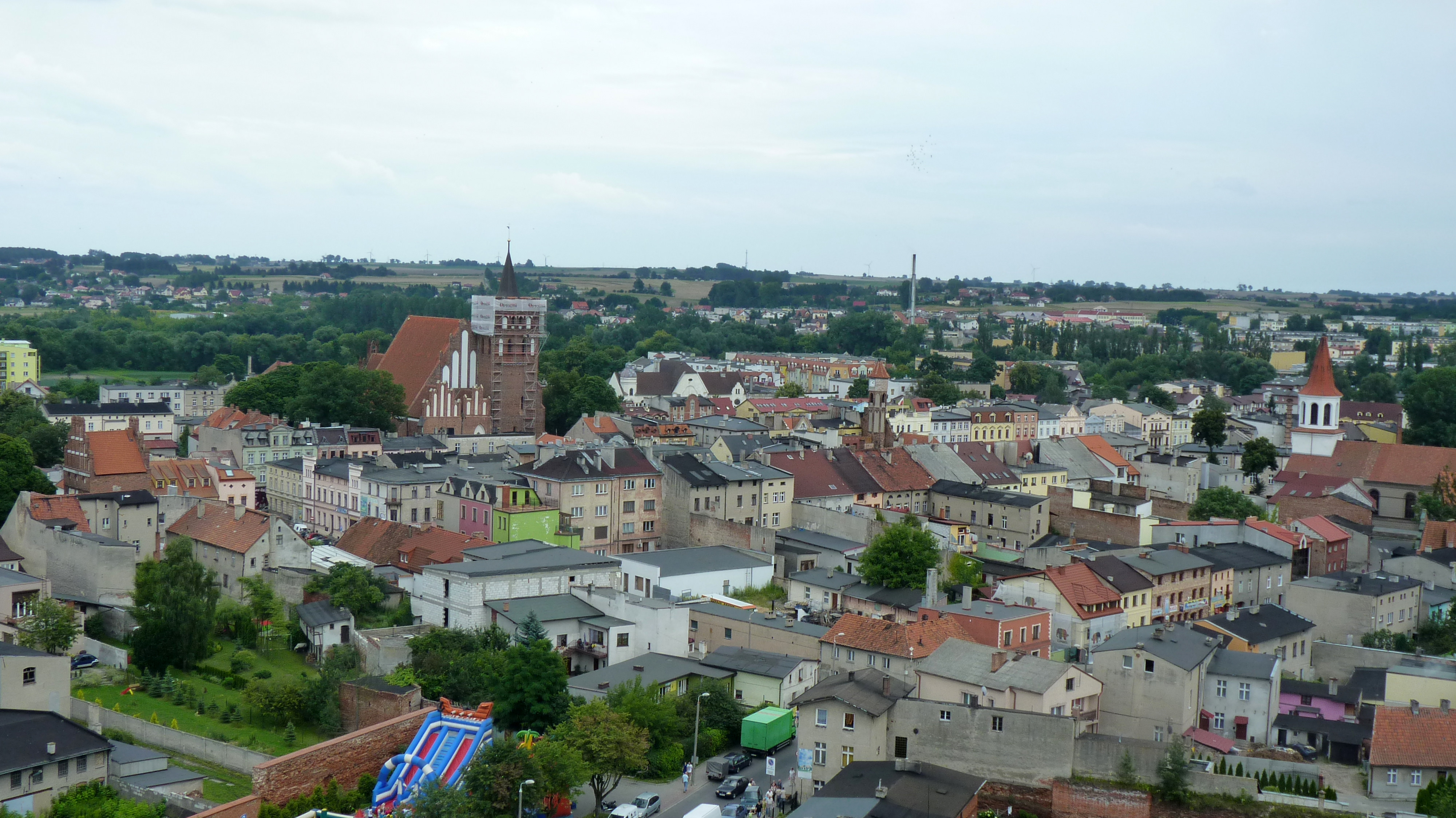 Brodnica widziana z wieży dawnego zamku